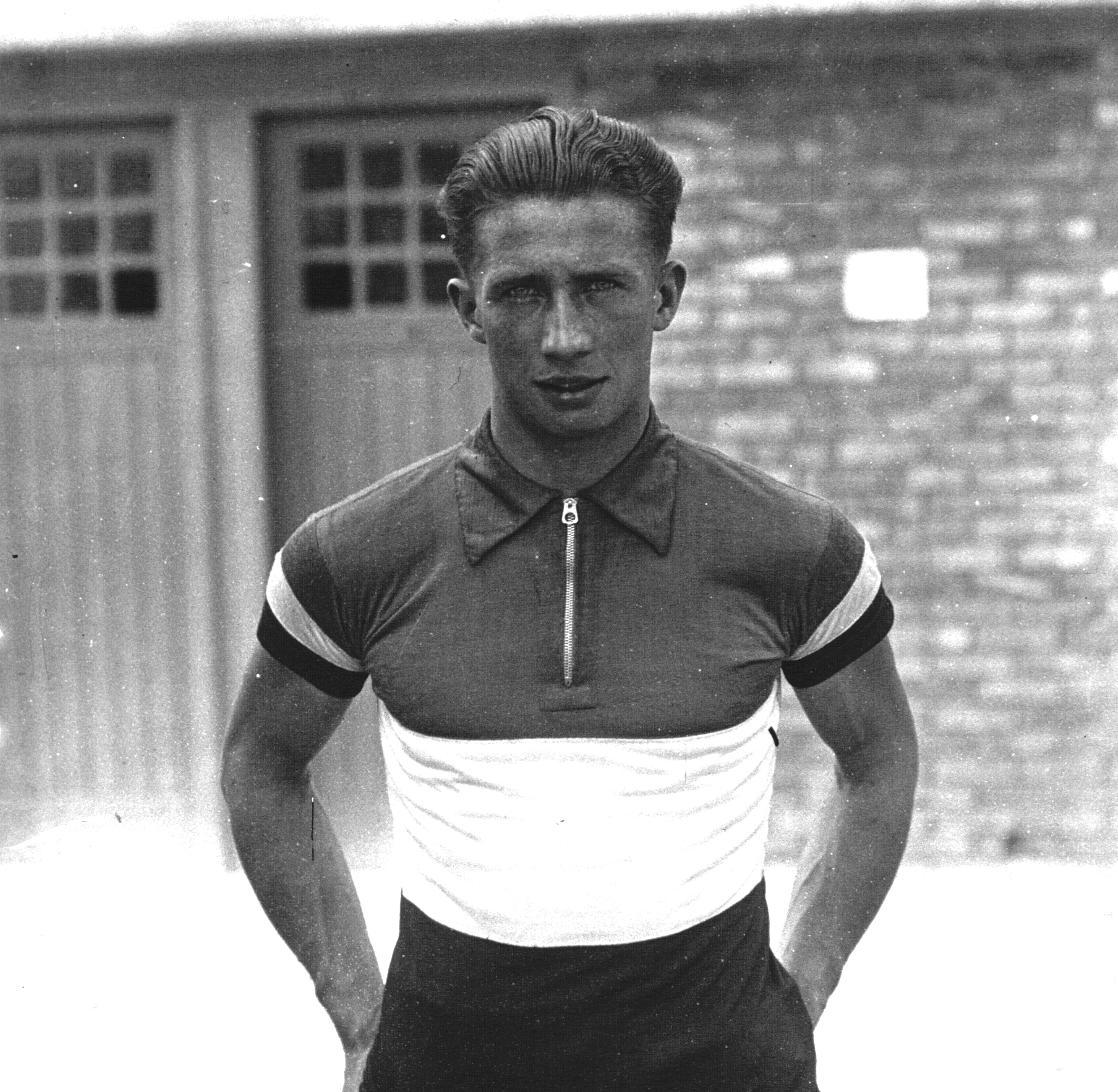 Gerardin (1/2 corps)